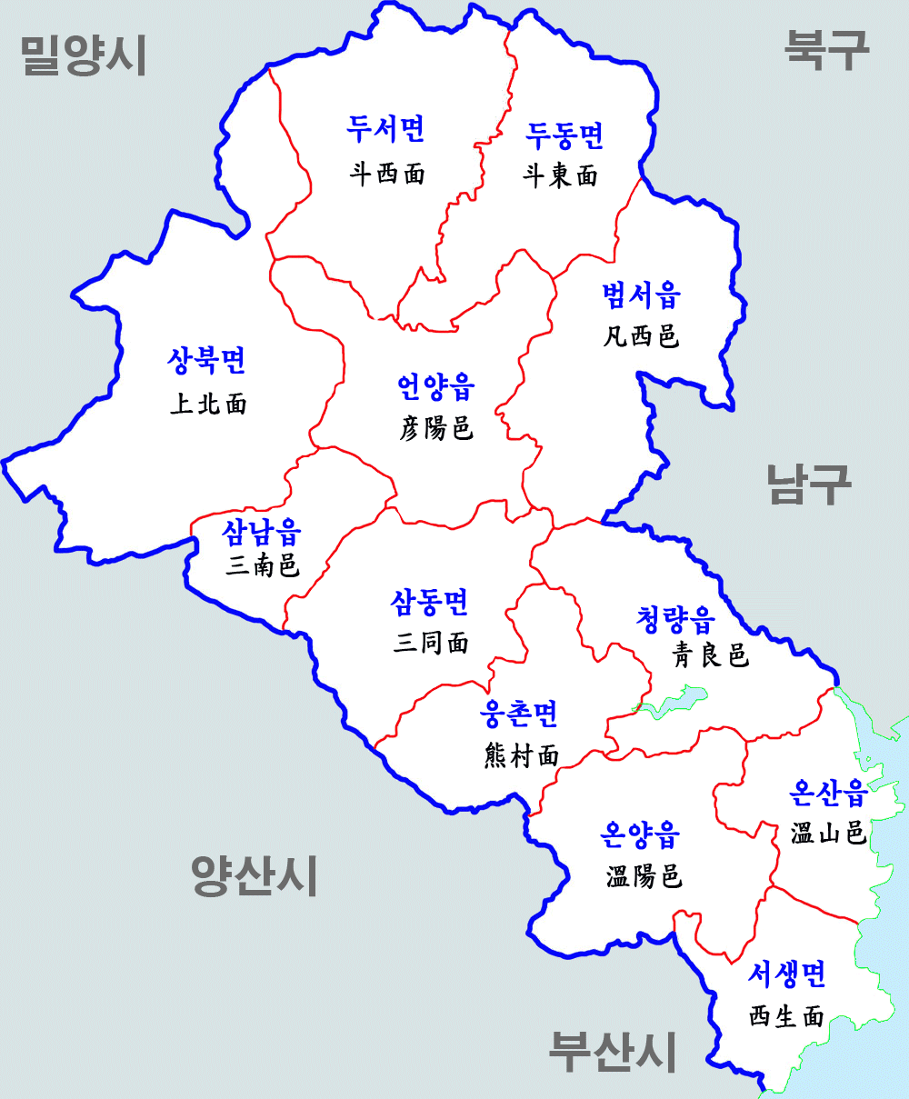 울산시 울주군 행정구역도